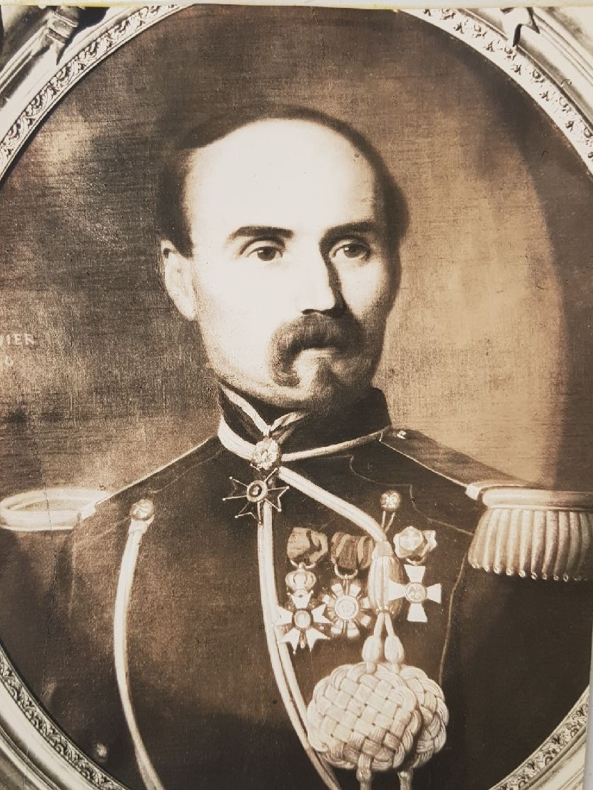 Commandant François de Veyssière gendre de Jean-Baptiste Royé-Vial, père de Raymond de Veyssière